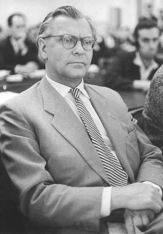 Oberstes Gericht, Globke-Prozess, Zeuge, Eberhard Rebling Zentralbild Brüggmann 12.7.1963 1. Strafsenat setzte Verhandlung gegen Globke fort. Der 1. Strafsenat des Obersten Gerichts der DDR setzte am 11. Juli 1963 die Hauptverhandlung gegen den millionenfachen Judenmörder Globke fort. Im Mittelpunkt steht der Komplex der berüchtigten "Endlösung der Judenfrage". Wie am Vortage sagten zahlreiche Zeugen aus, die die faschistische Judenverfolgung am eigenen Leibe erlebten. UBz: Der Zeuge, Musikwissenschaftler Prof. Eberhard Rebling, schilderte die Auswirkungen der Globke-Gesetze in Holland. Er sagte, daß von den damals in Holland lebenden 125.000 Juden mehr als 100.000 deportiert wurden. Nahezu 99.000 von ihnen wurden ermordet.